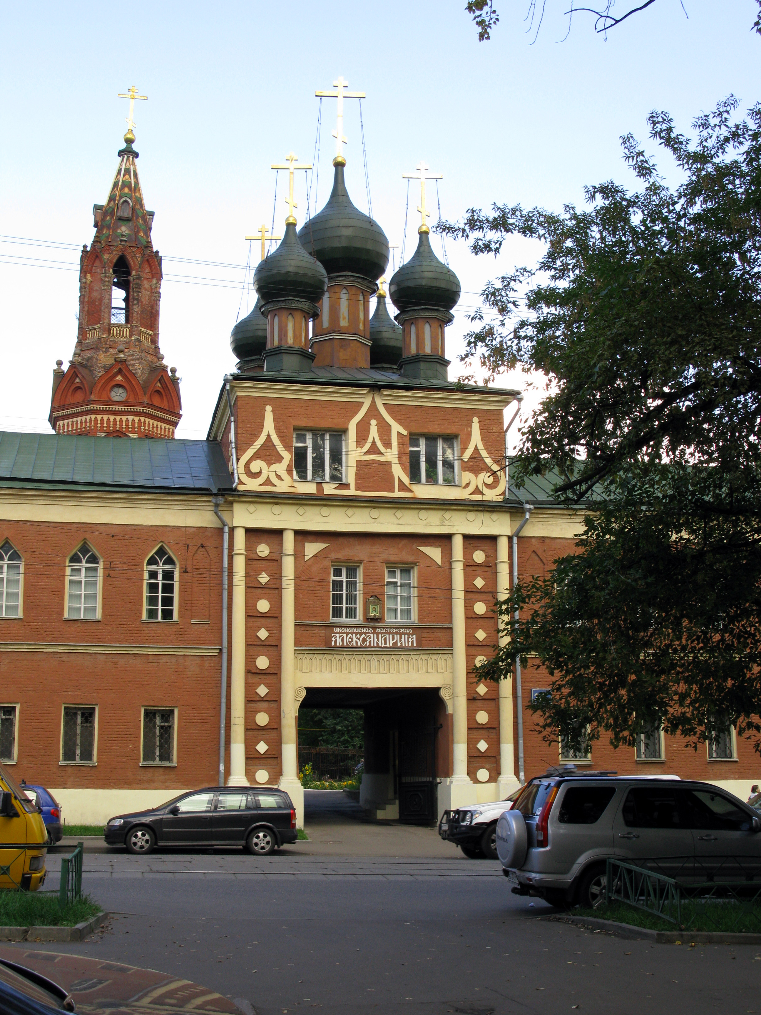 Московский Никольский единоверческий монастырь